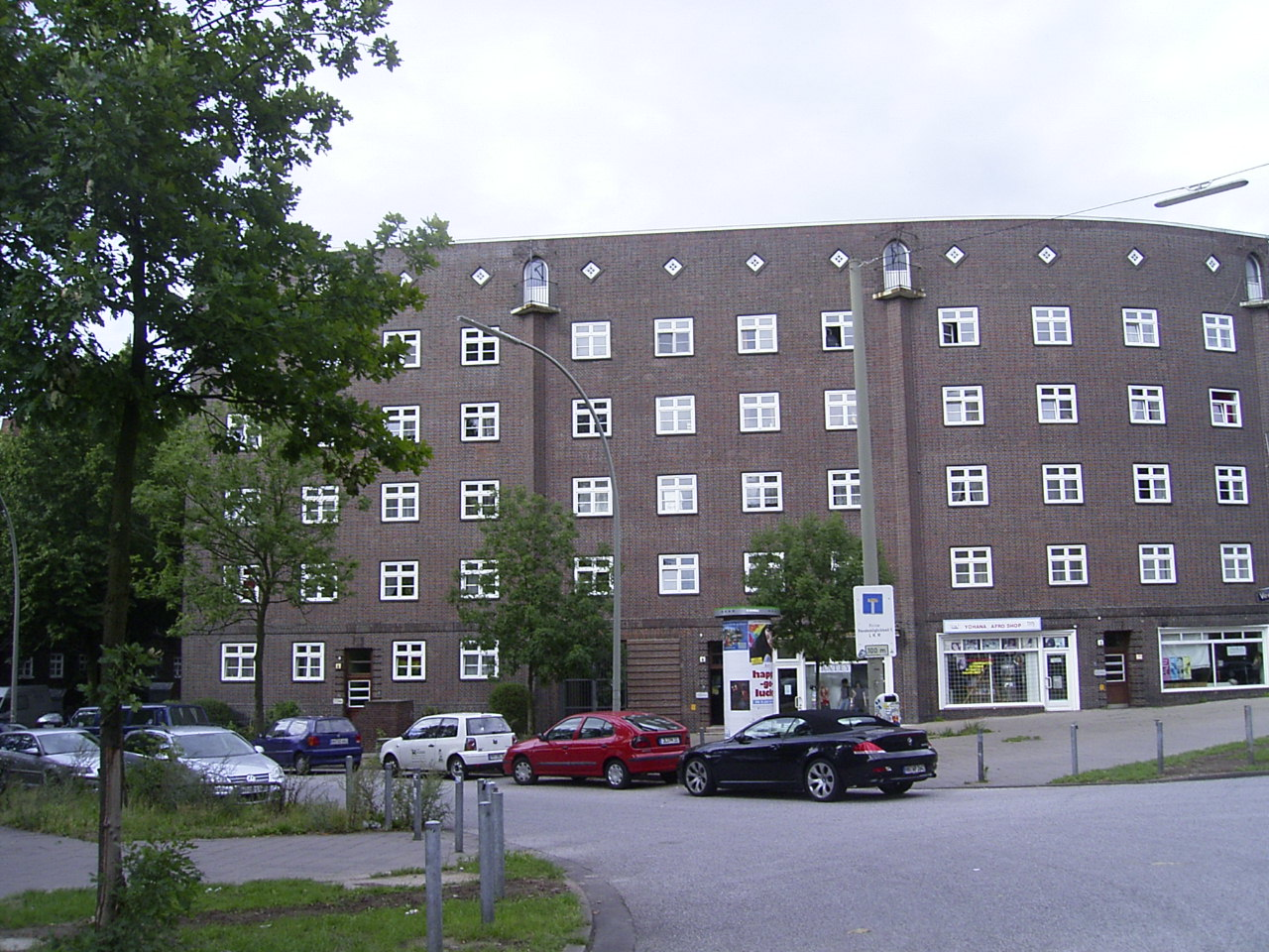 Der Wohnblock an der Veddeler Brückenstraße auf der Veddel wurde 1926/27 von Elingius & Schramm unter Mitwirkung von Hermann Höger erbaut.